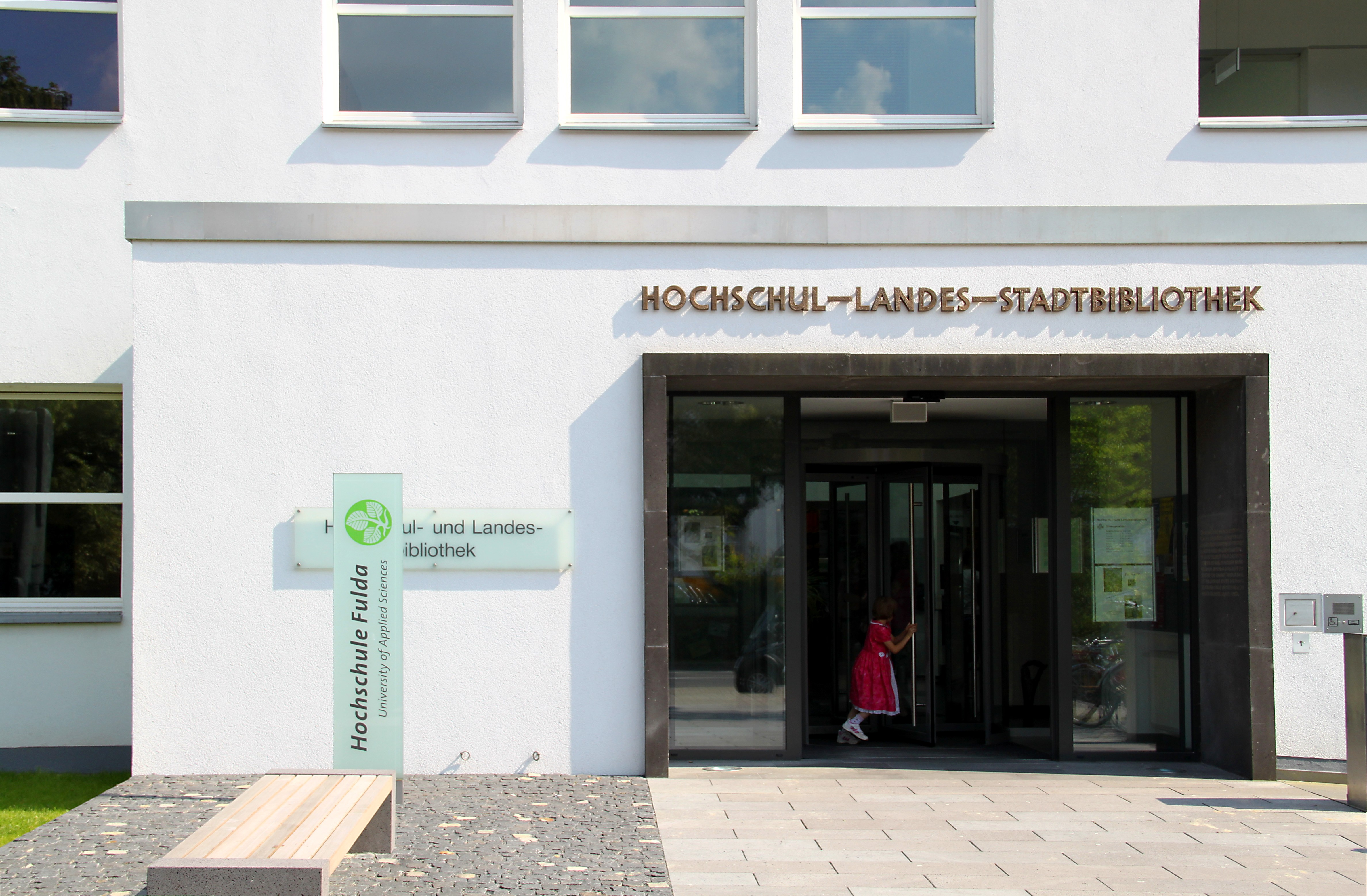 Hochschul- und Landesbibliothek Fulda am Standort Heinrich-von-Bibra-Platz